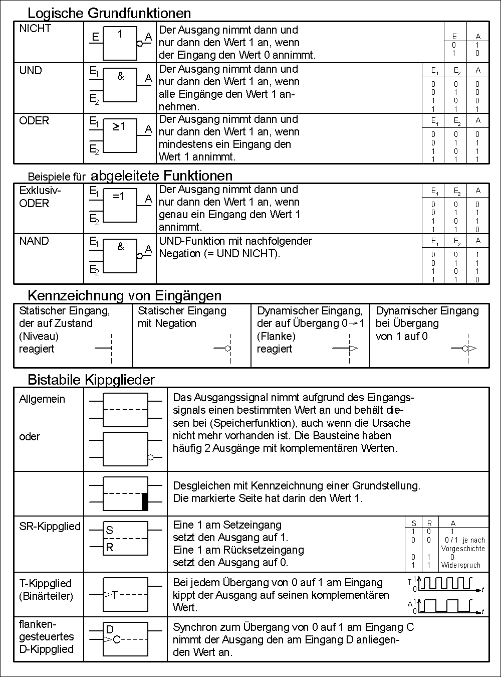 Digitale Messtechnik